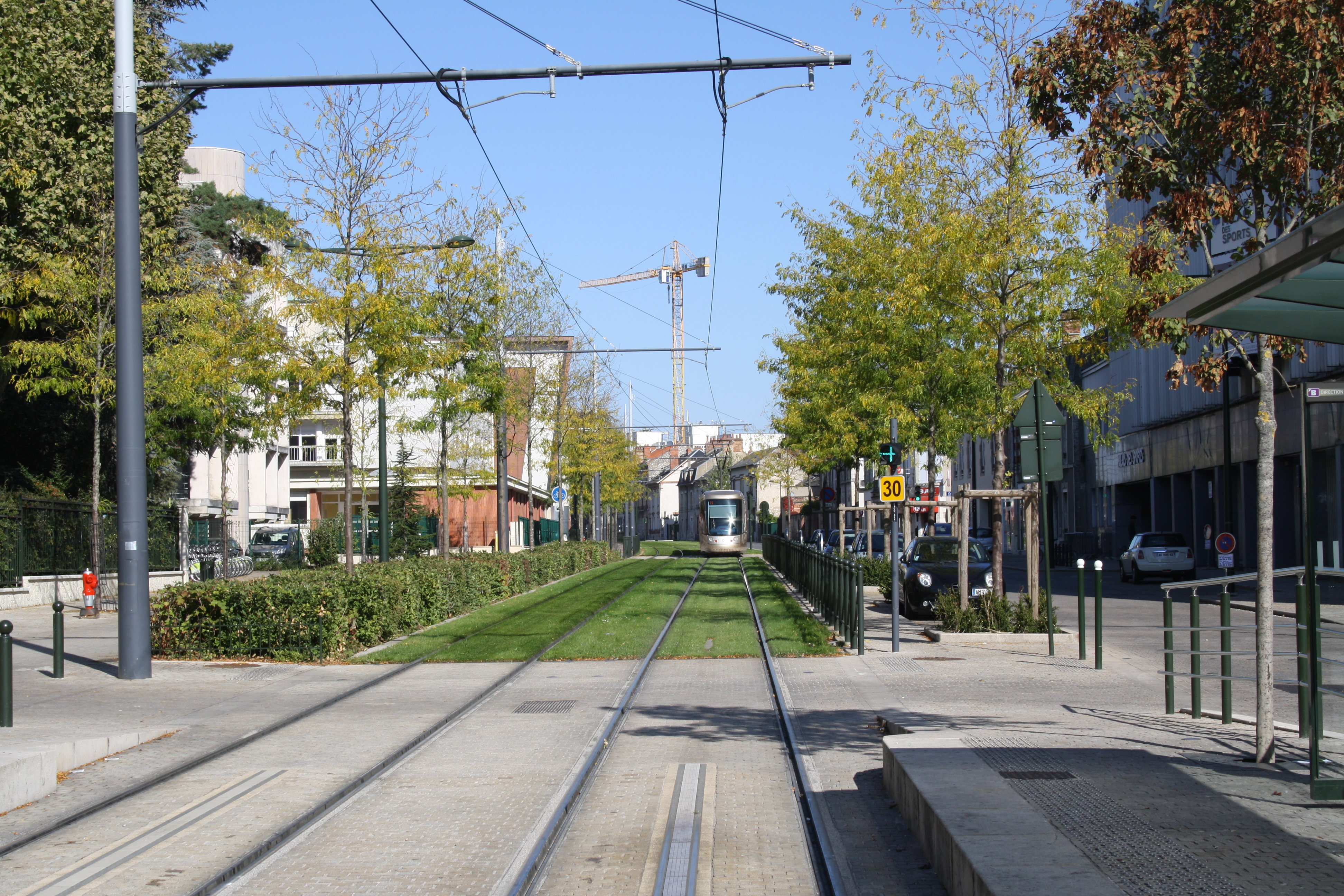 Orléans, station Eugène Vignat